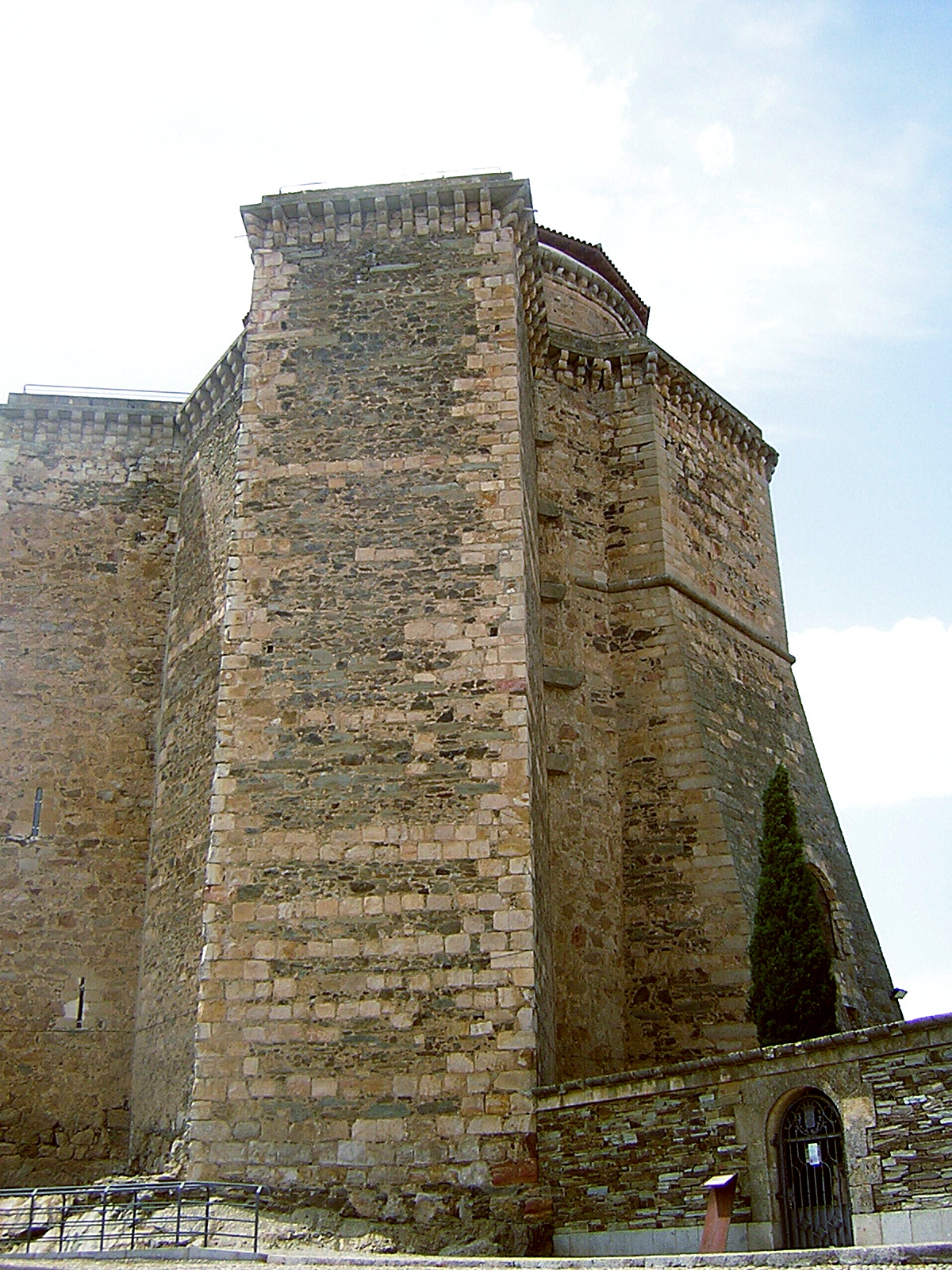 Castillo de los duques de Alba en Alba de Tormes (Salamanca, España).